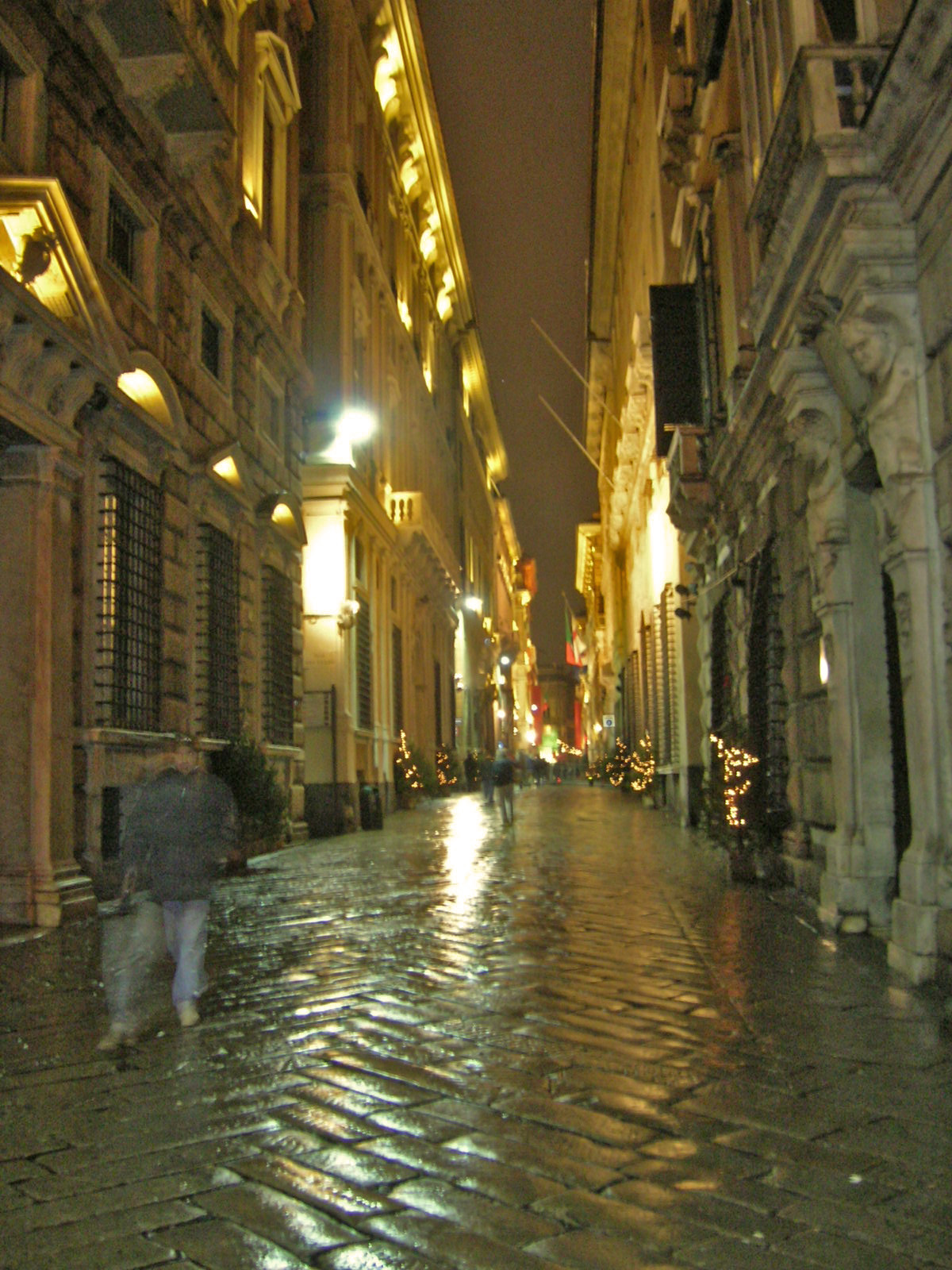 Via garibaldi, la via Aurea, Genova - Italia.